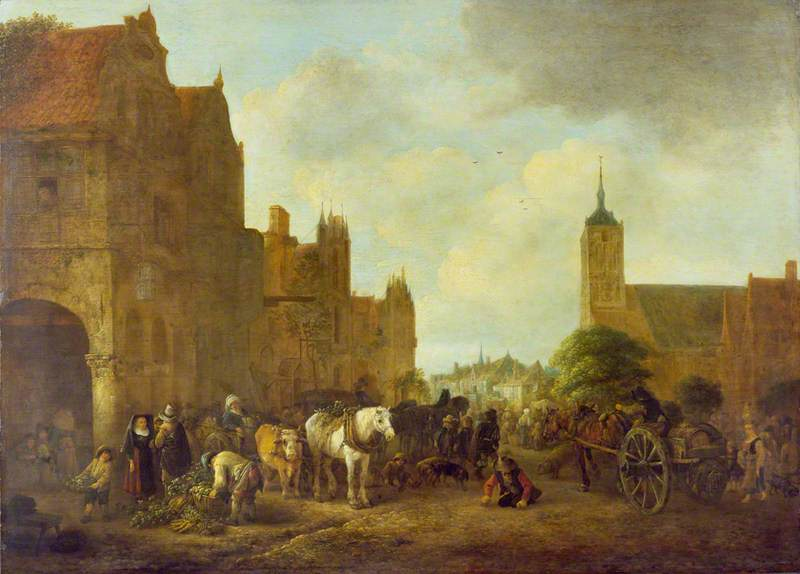 Prinzipalmarkt in Münster